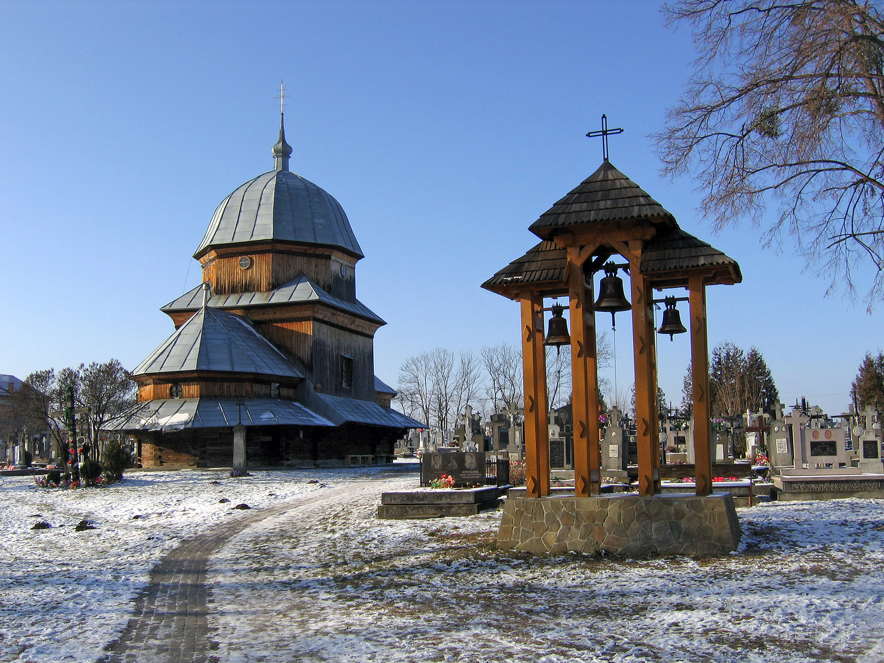 Церква Різдва Пресвятої Богородиці (дер.), Жовква, вул.І.Франка, 9 (Винники)